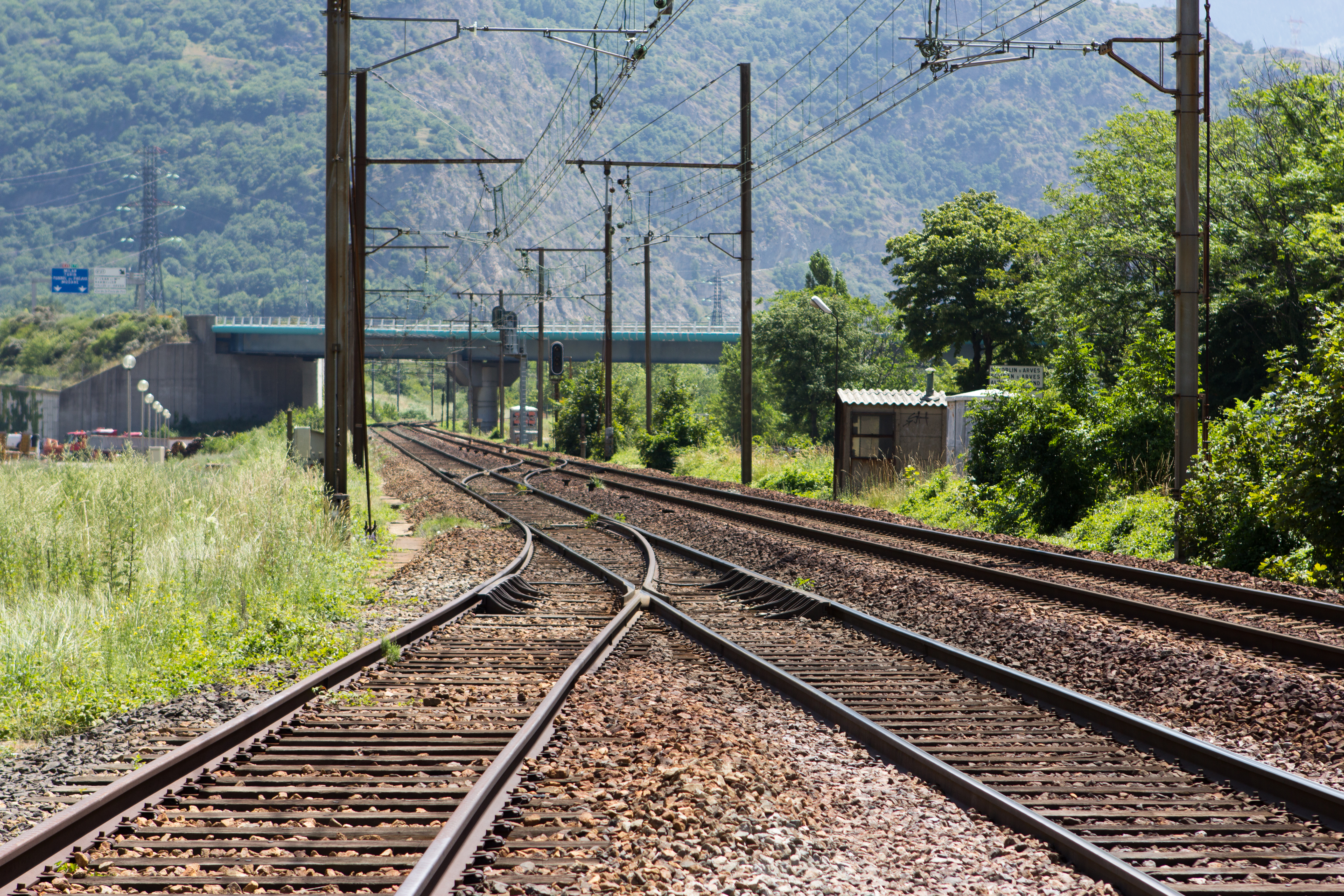 Ligne de la Maurienne - L'évitement de Pontamafrey - Raccordement amont au PK 204,7 - Commune de Pontamafrey-Montpascal, Savoie, France